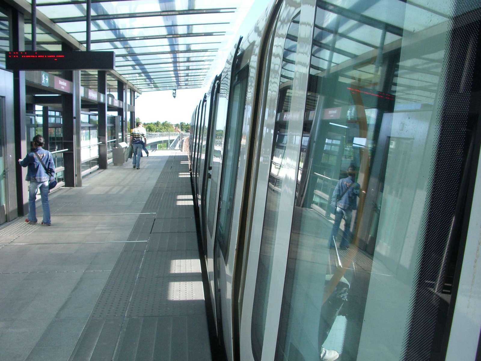 Universitetet Metro station